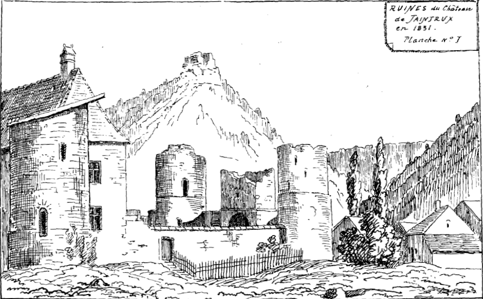 Le château de Taintrux (Vosges), tel qu'il était en 1831.